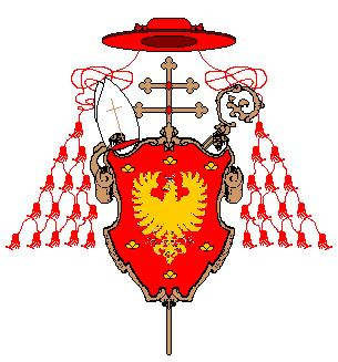 Stemma del Cardinale Giuseppe Pozzobonelli, Arcivescovo di Milano.